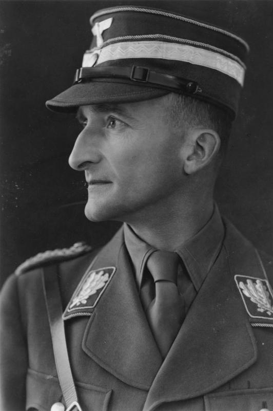 Graf Fink von Finkenstein; SA-Obergruppenführer, SA-Gruppe "Schlesien", Breslau